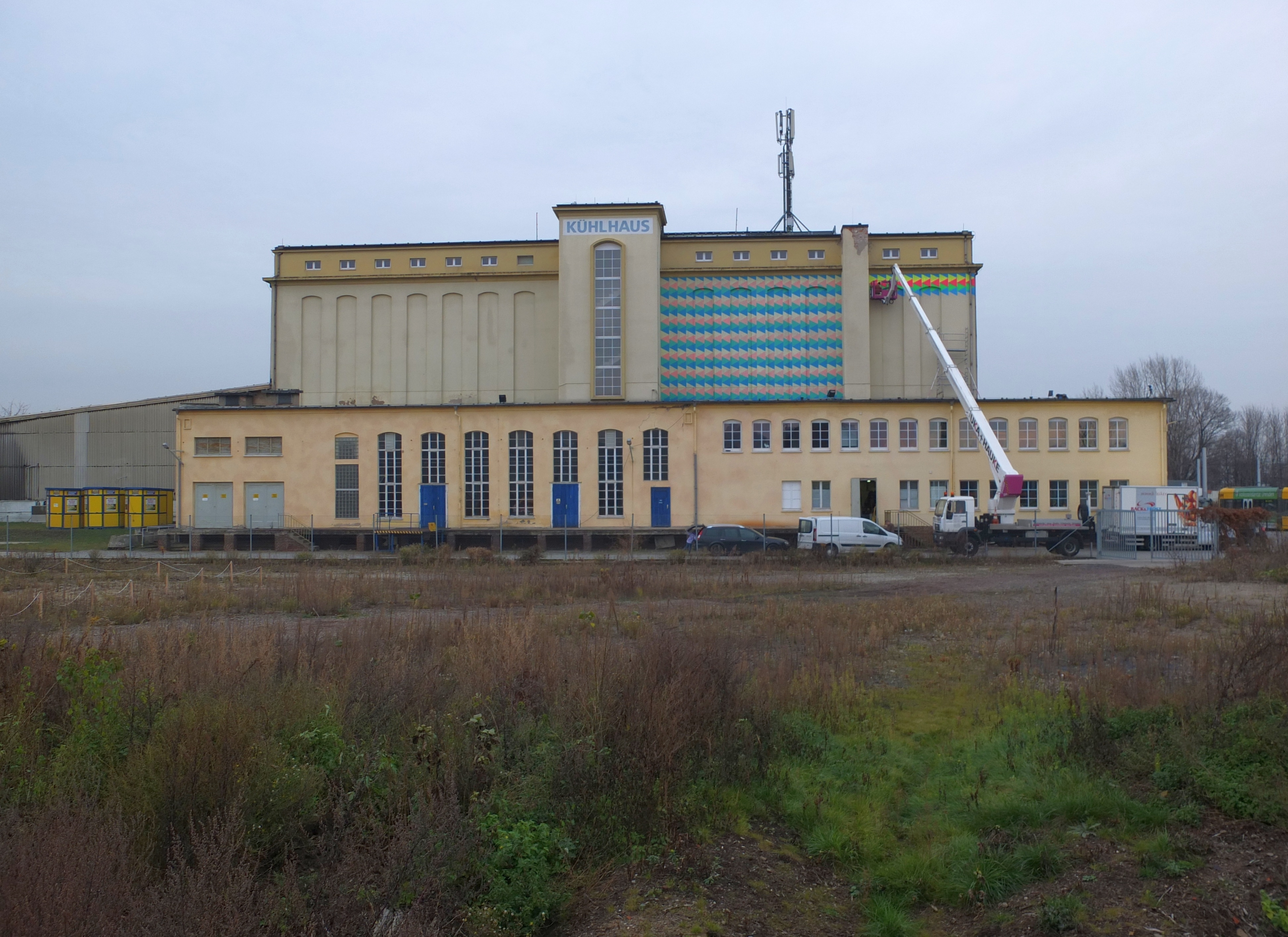 Das Kühlhaus Frigolanda im Ostragehege in Dresden